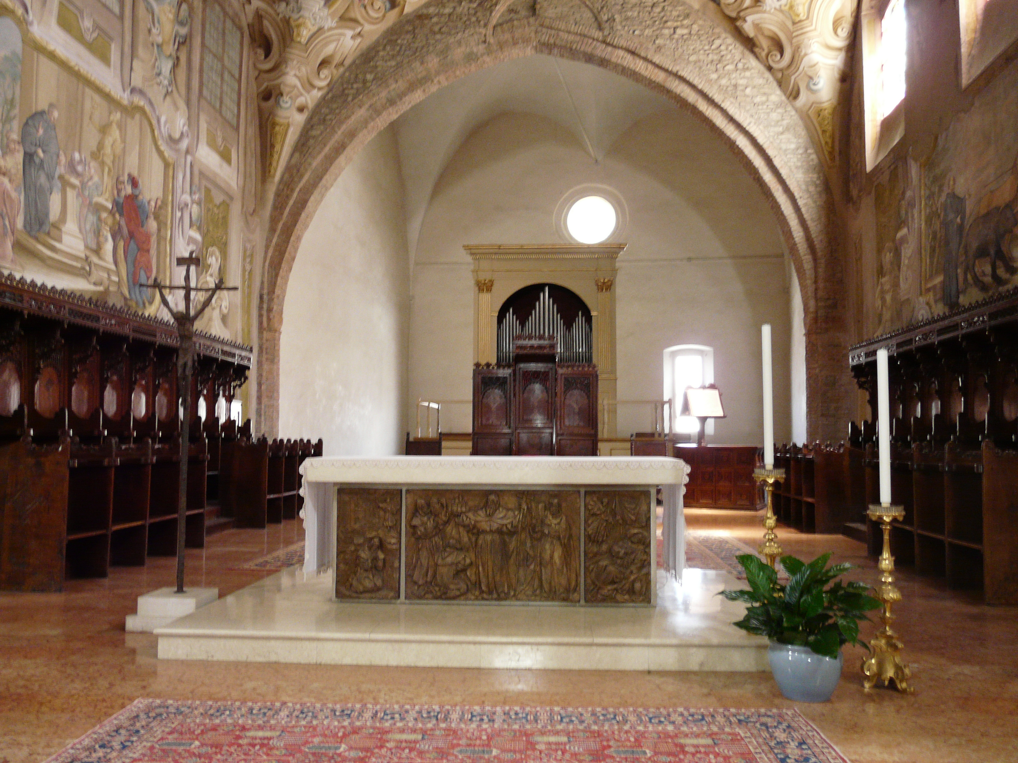 Immagini dell'abbazia di San Colombano di Bobbio, Emilia-Romagna, Italia